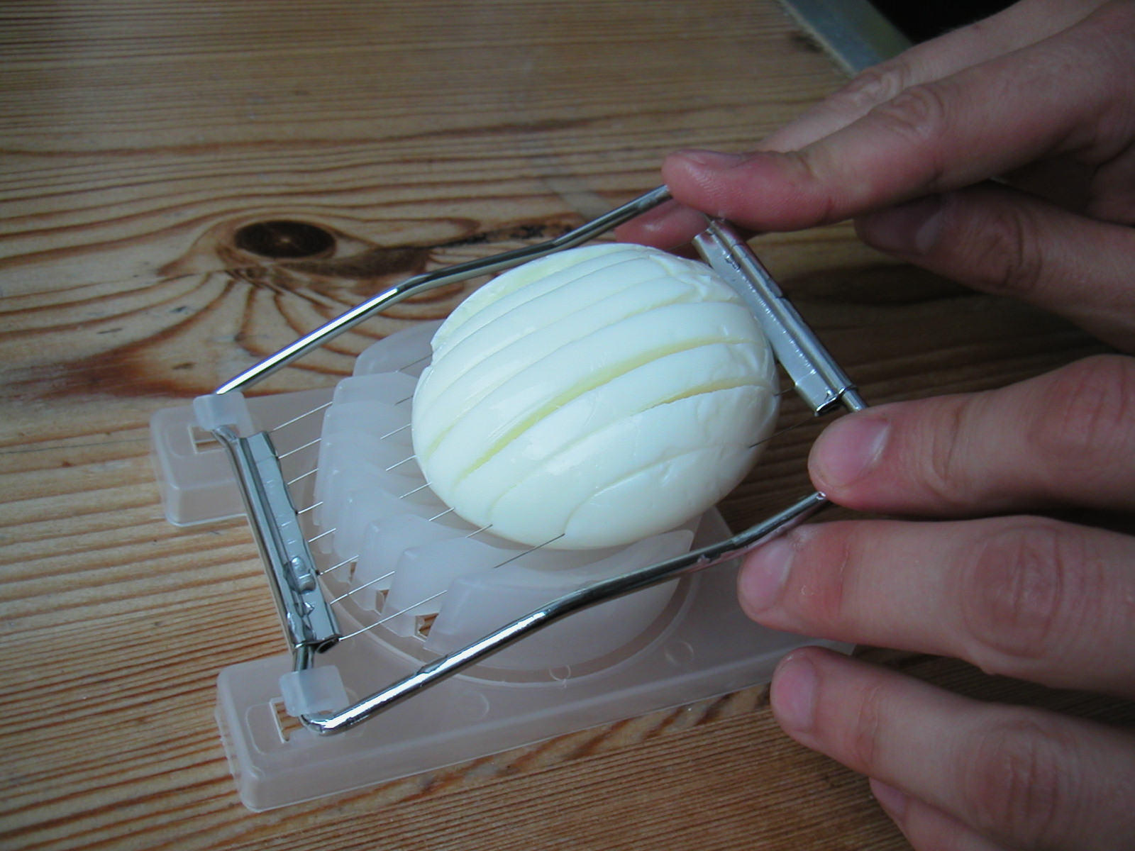 Hårdkogt æg